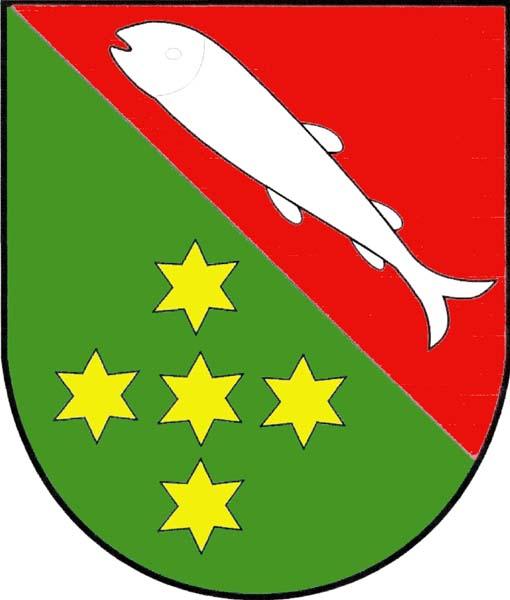 Znak obce Ponětovice